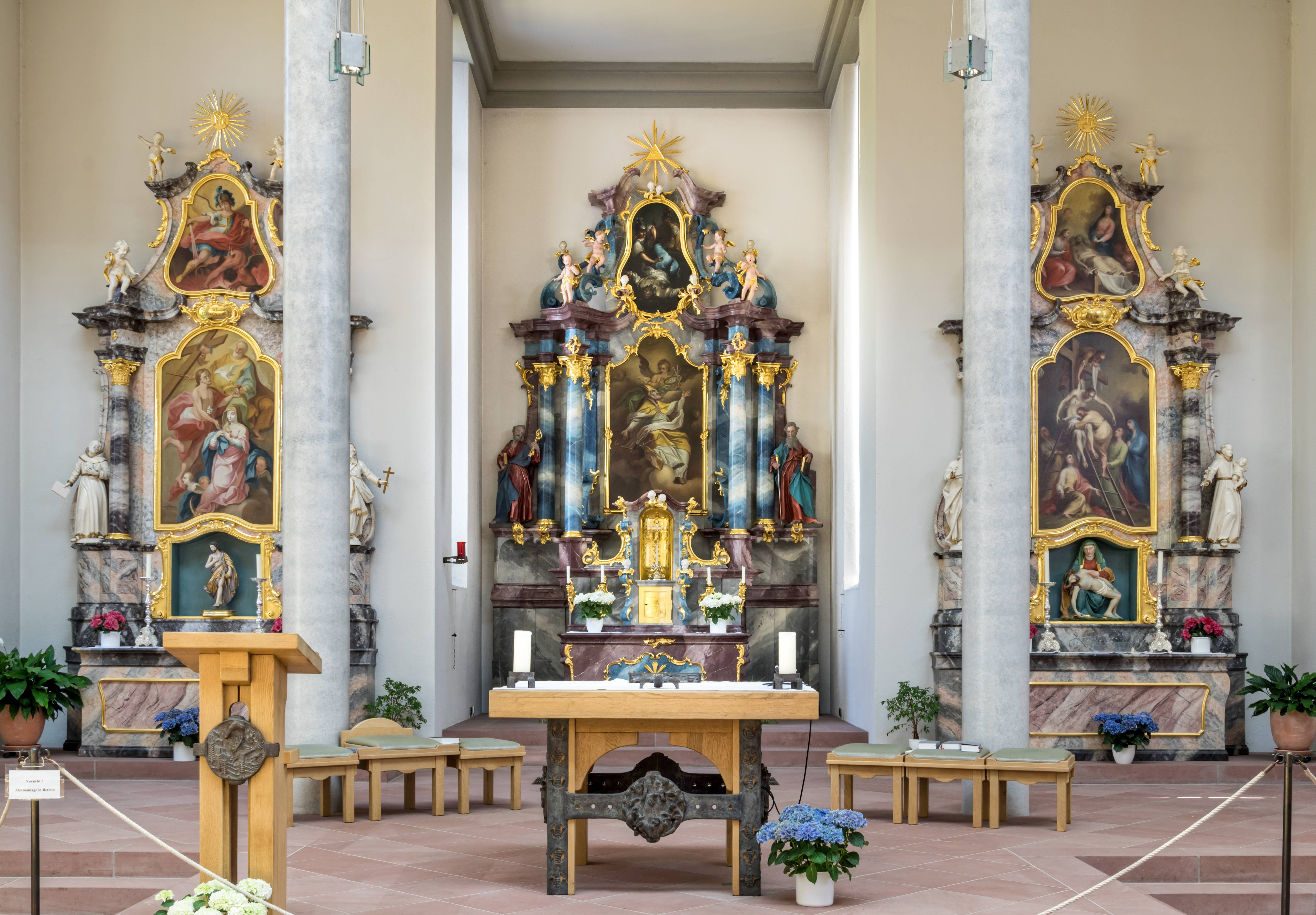 Bilder der katholischen Kirche St. Blasius in Wolfenweiler Die drei Altäre